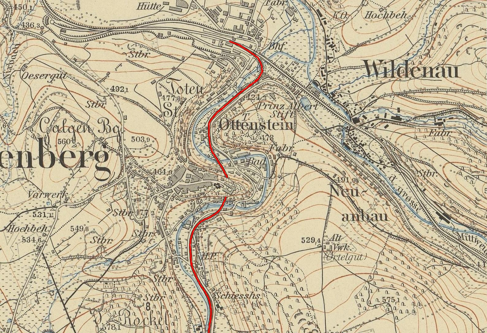 Stadt Schwarzenberg/Erzgeb. mit hervorgehobener Eisenbahntrasse